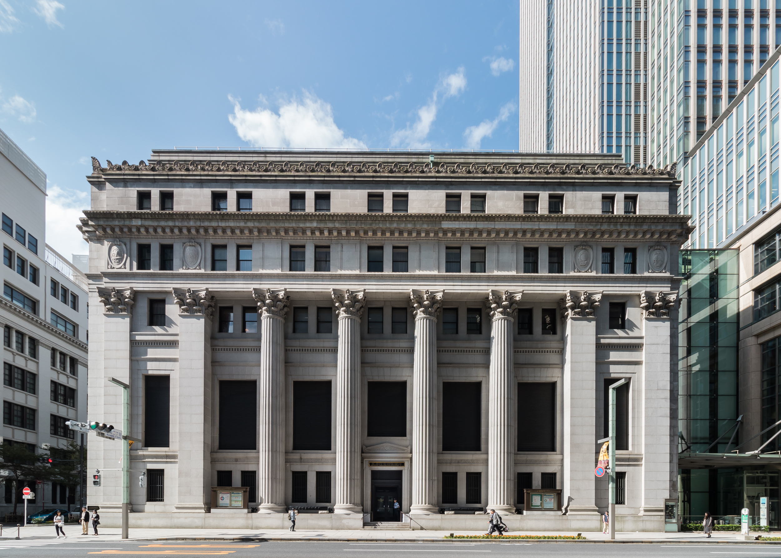 三井本館（重要文化財）。